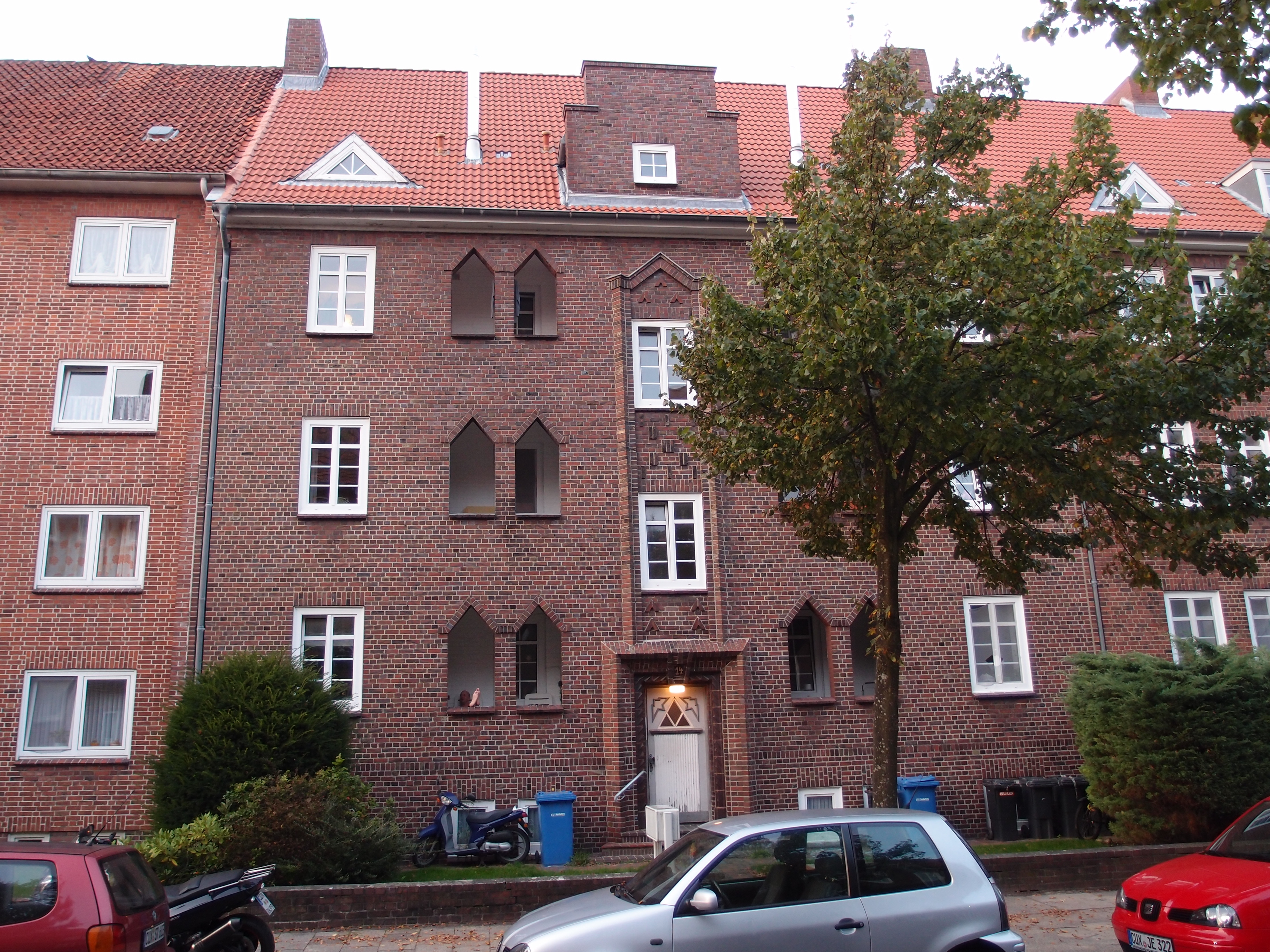 Cuxhaven, Gorch-Fock-Straße 14, Straßenansicht. Ensemble.